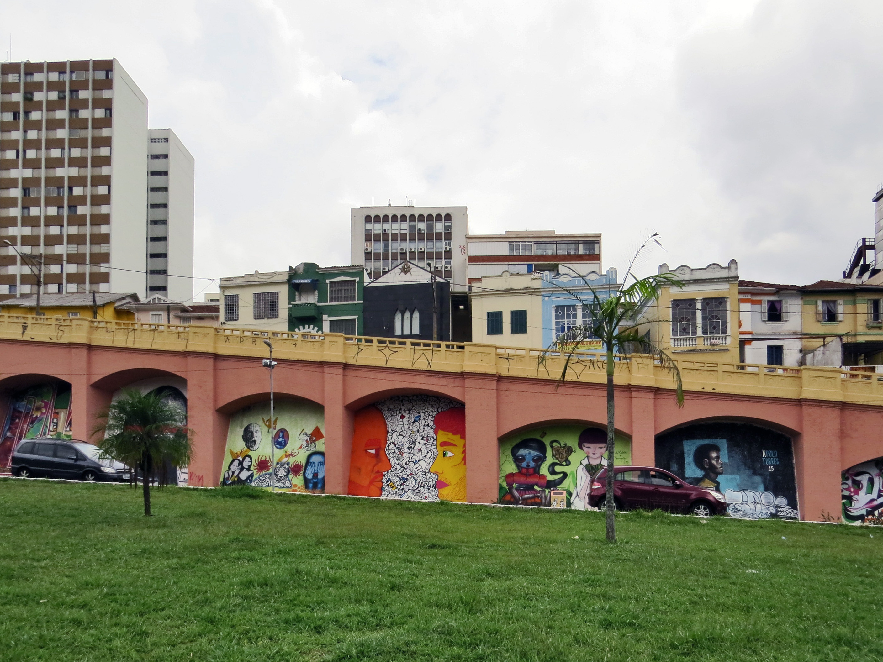 centro de são paulo fevereiro de 2015